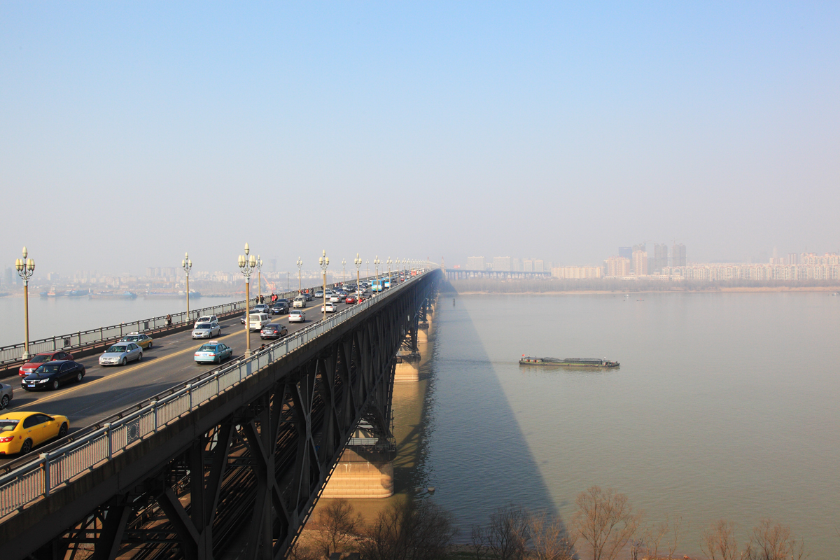 Nanjing Bridge